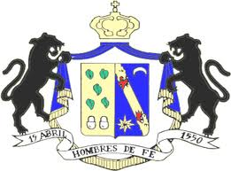 Escudo de la ciudad pacasmayina de Guadalupe